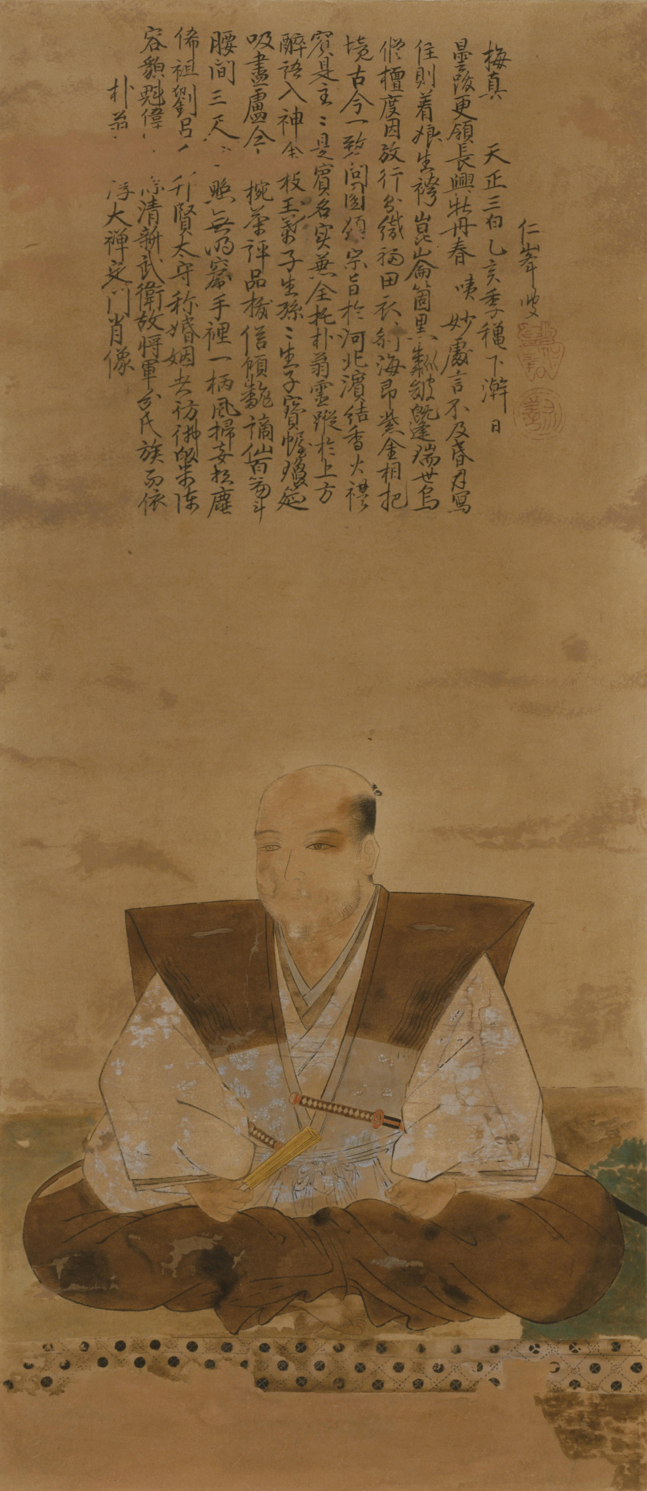 織田又六信直と伝わる肖像画(模本)。